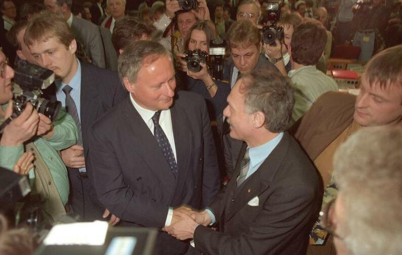 ADN-ZB/Kluge/23.2.90/Leipzig: SPD-Parteitag Ein herzlicher Händedruck zwischen Ibrahim Böhme und Oskar Lafontaine, der als Gast am SPD-Parteitag teilnimmt.